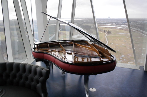 PH flygelet i Bella Sky Bar